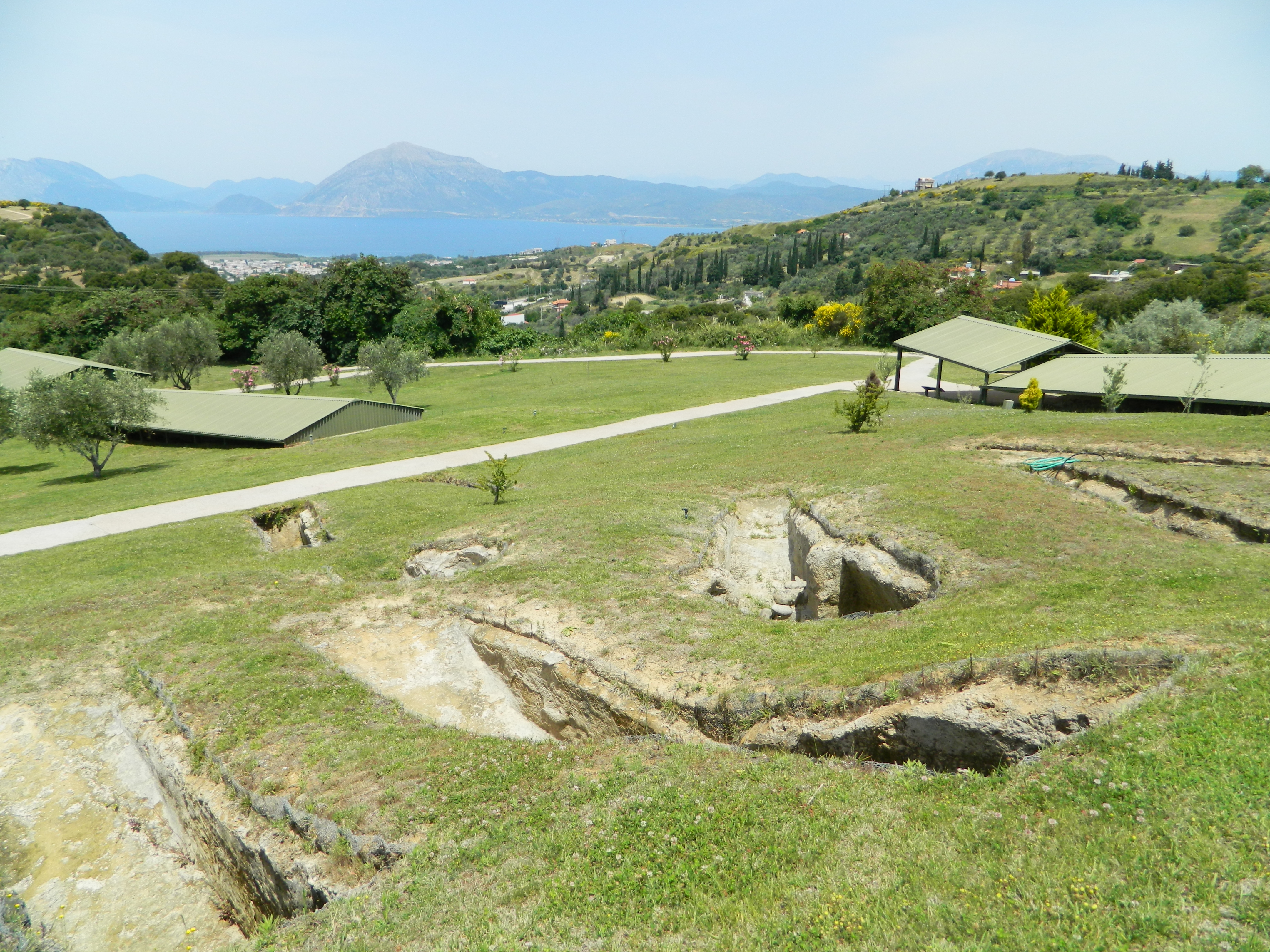 «Βούντενη»